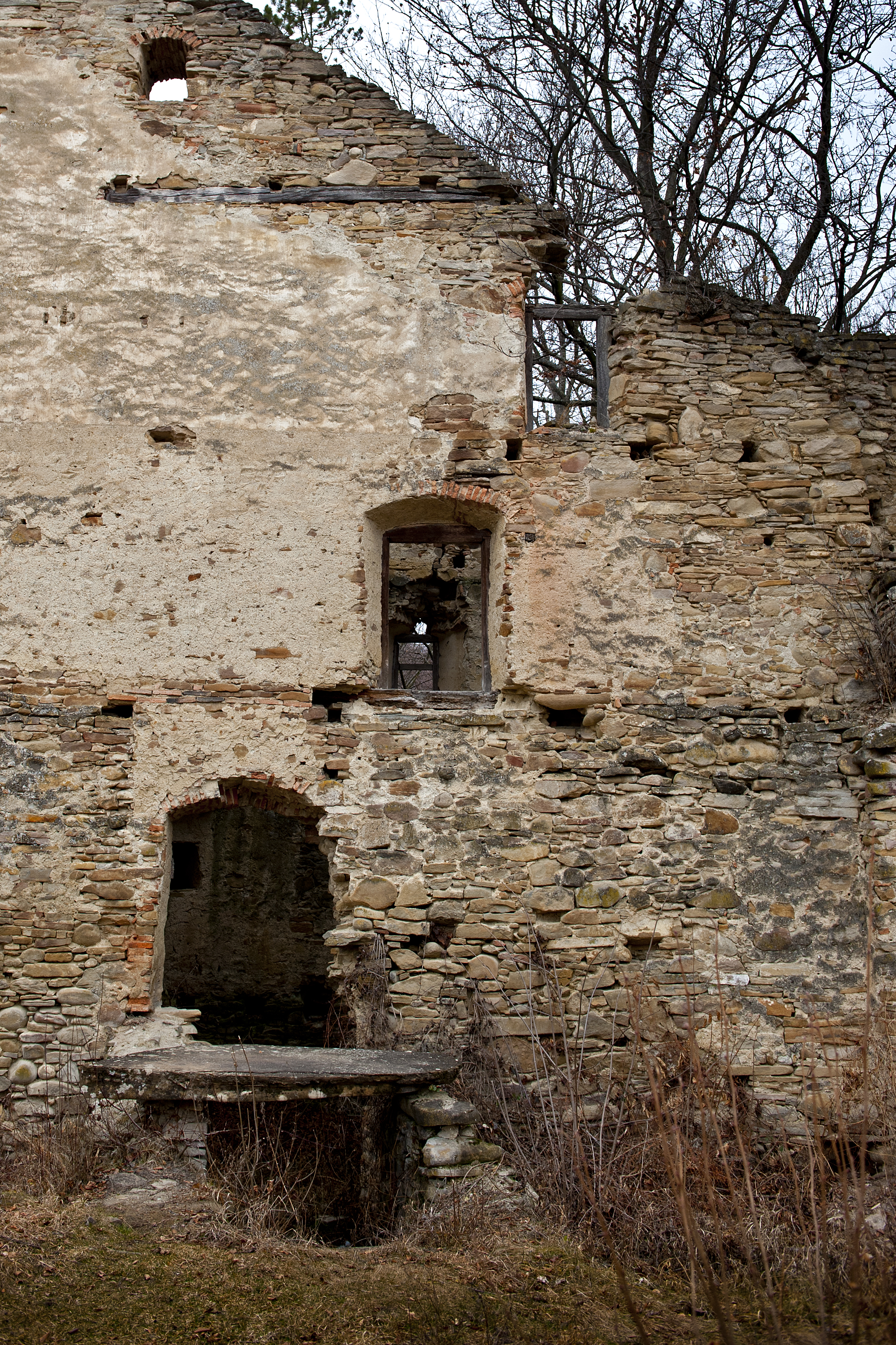 Așezarea romană de la Saschiz